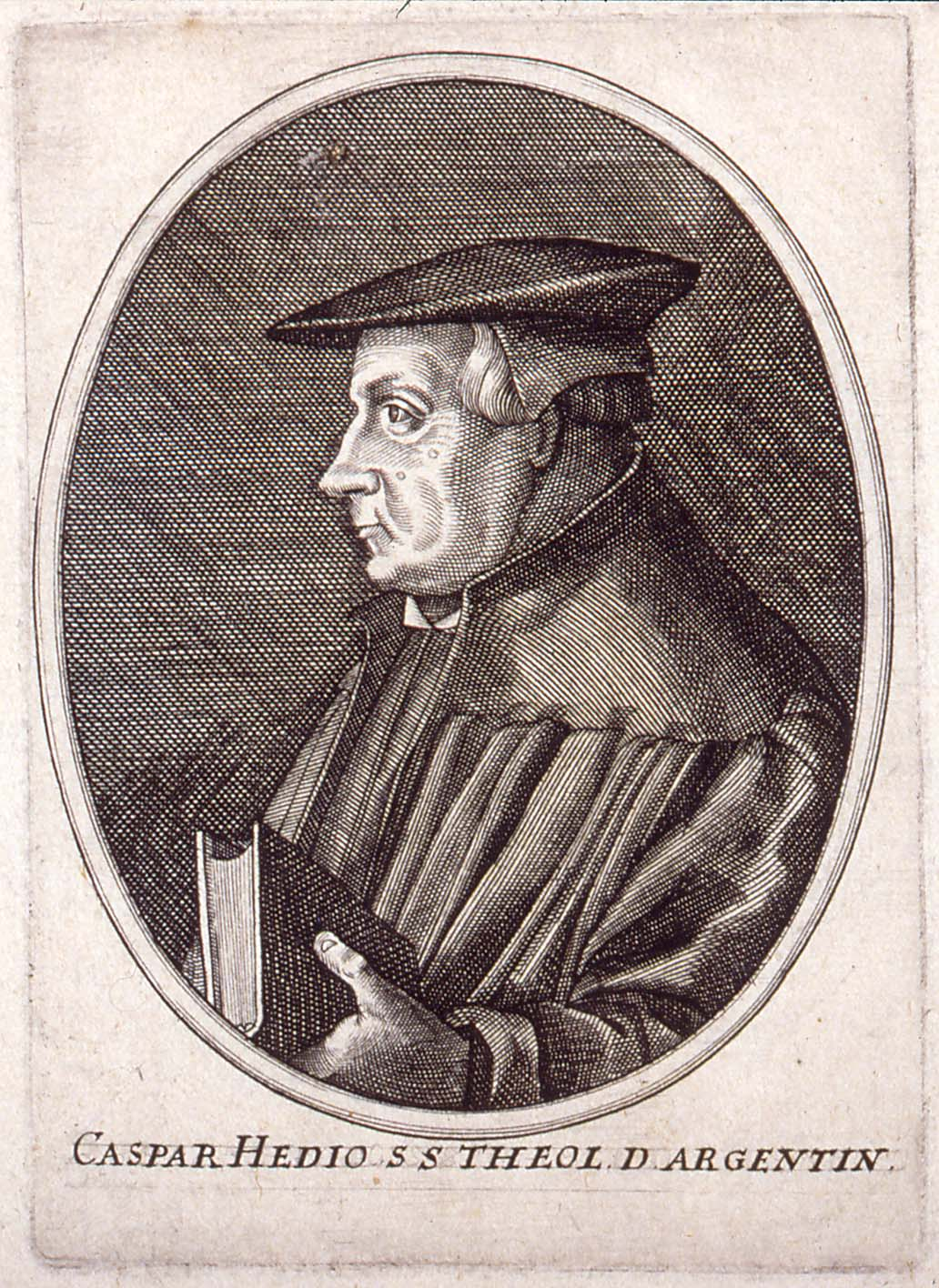 Caspar Hedion . Théologien, réformateur, professeur à Strasbourg, fondateur du Stift. Mi-corps à gauche en médaillon, ovale.